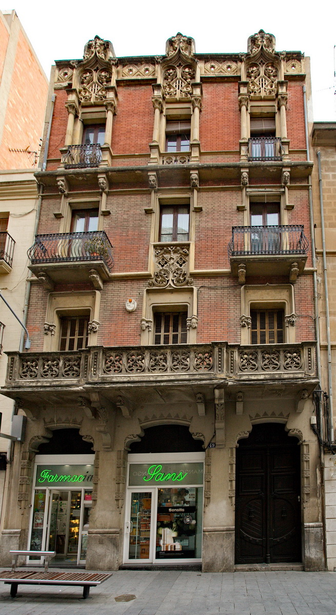 Casa Punyed (Reus)